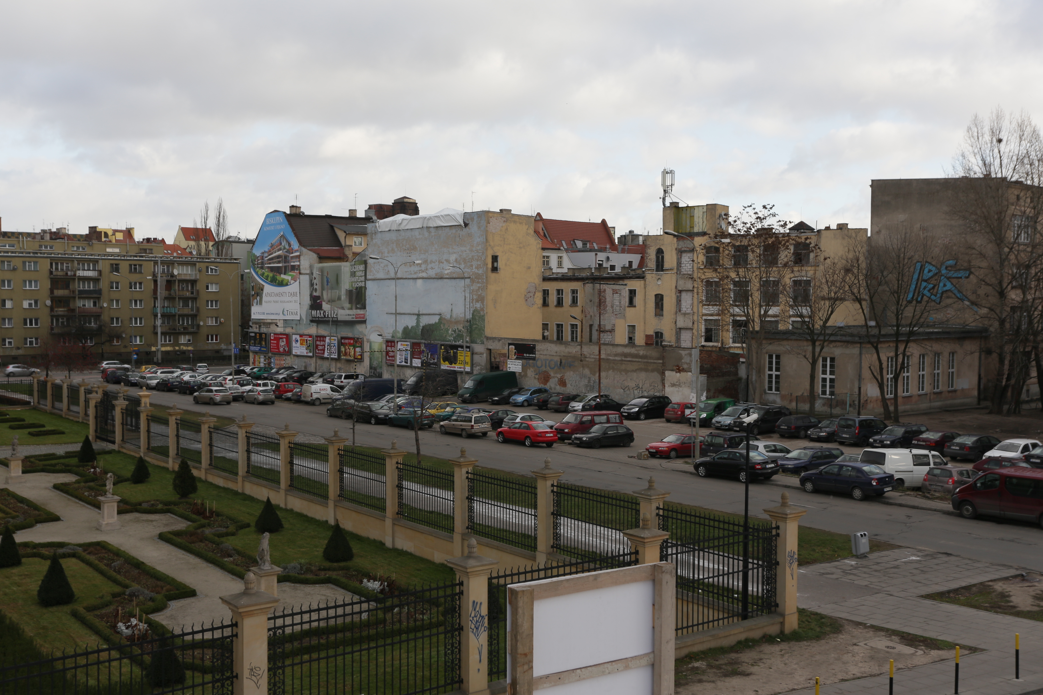 ulica Zamkowa z dachu budowanego Narodowego Forum Muzyki, po lewej ogrody pałacu królów pruskich, po prawej "dziki" parking